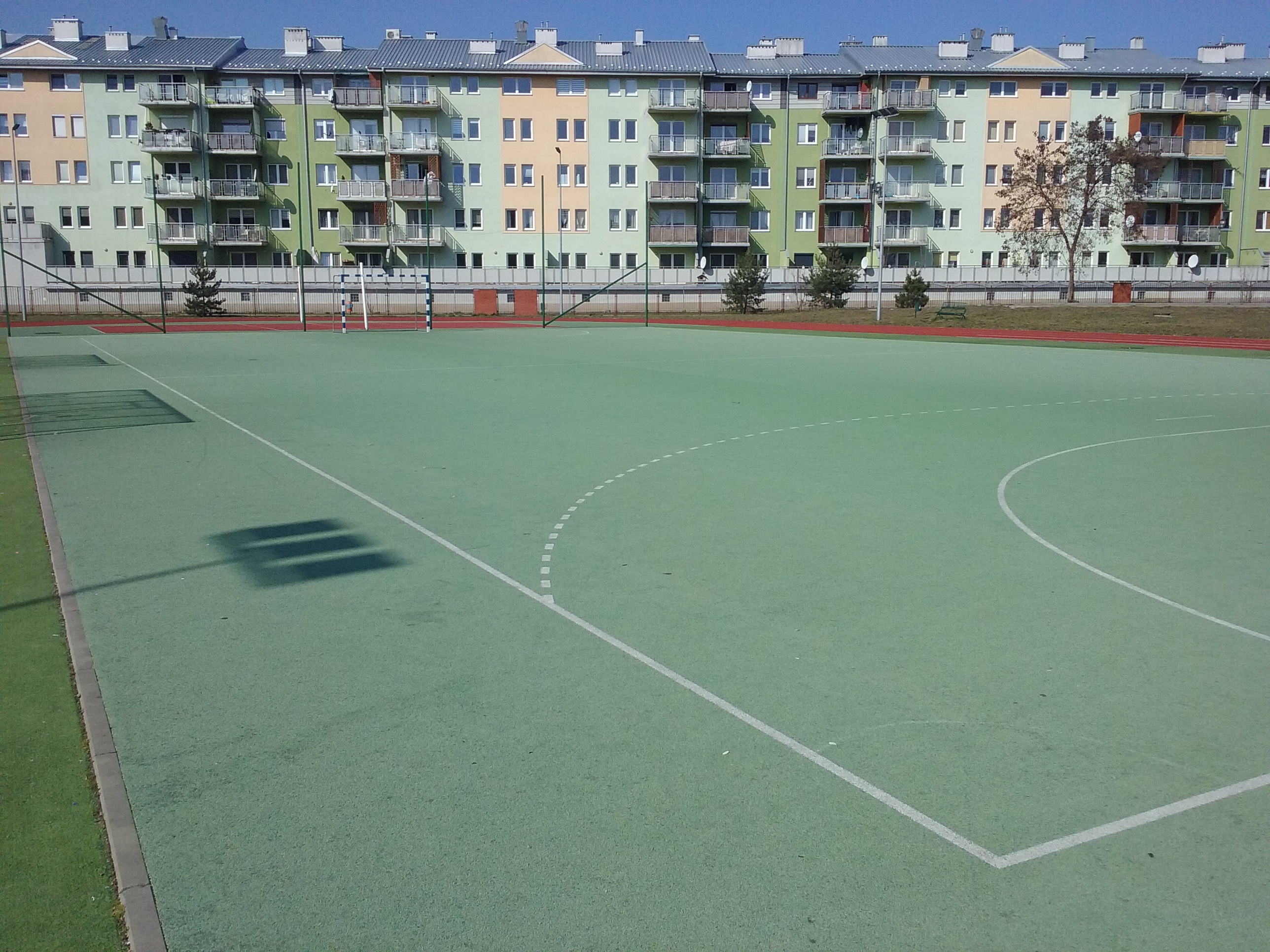 Boisko do piłki nożnej na osiedlu Hubala II w Tomaszowie Mazowieckim przy ulicy Leona Maya